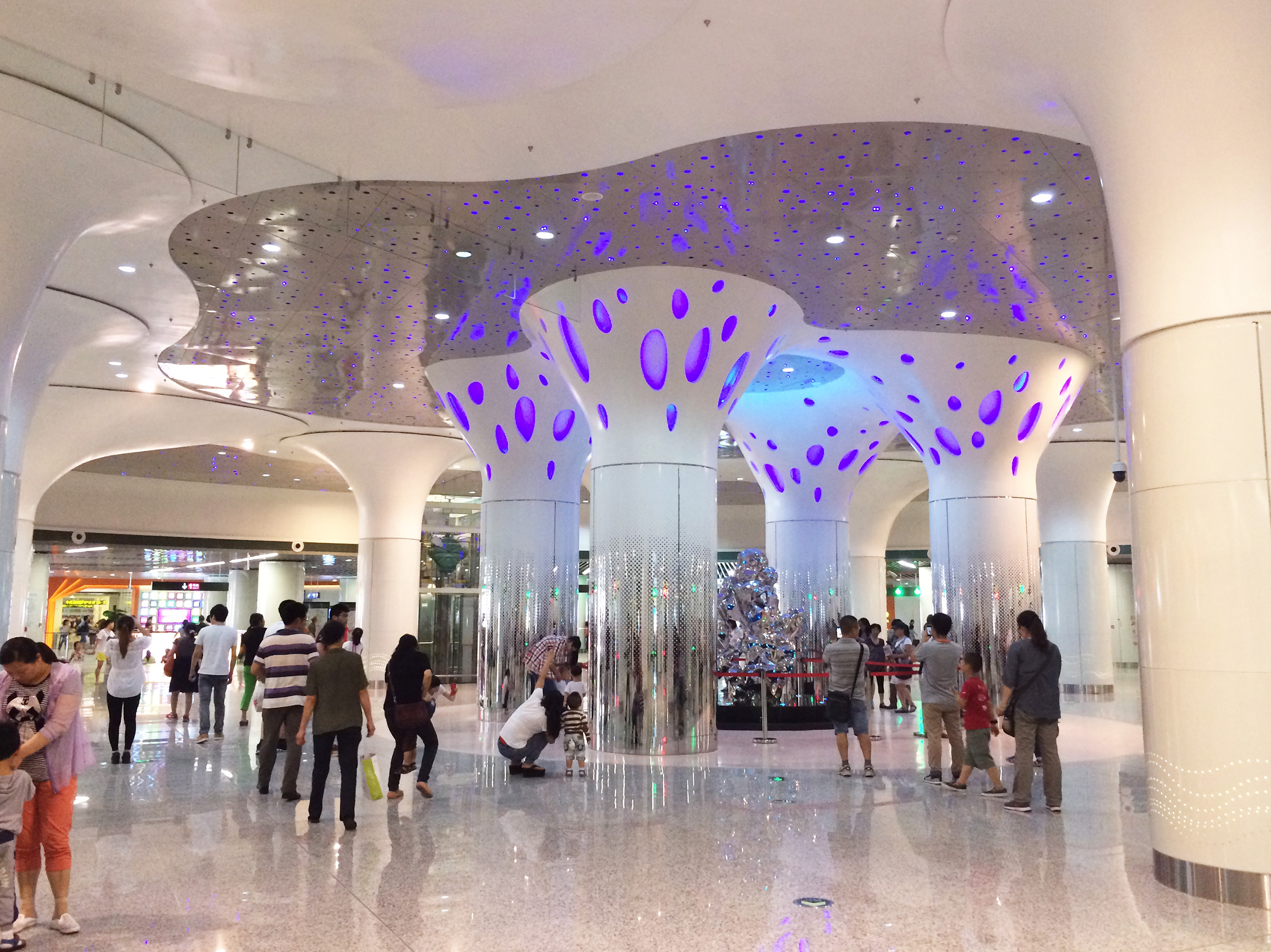 無錫地鐵三陽廣場站大廳層“城市之心”景觀